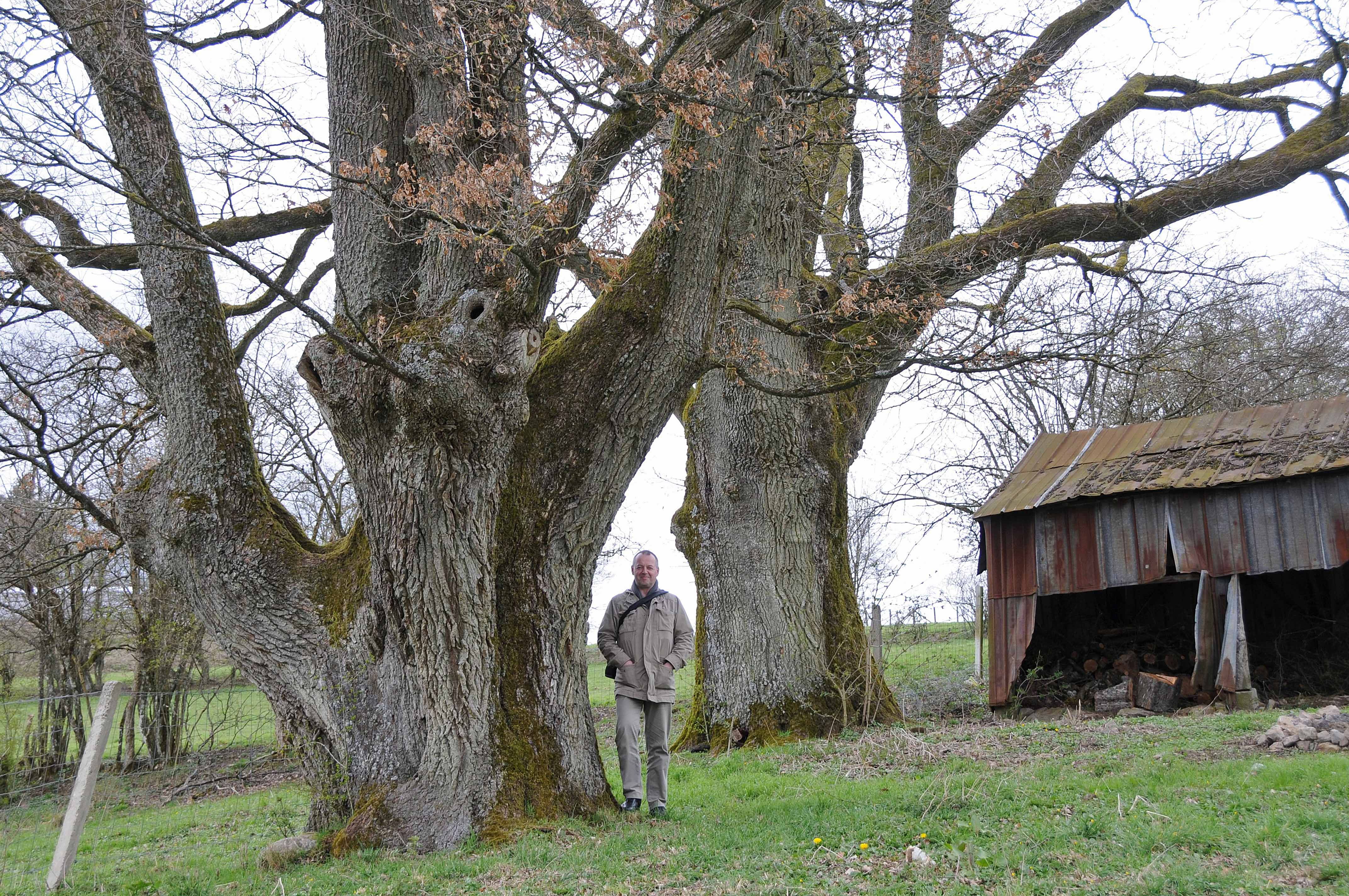 Eechen zu Munzen. Munzen + Kategorie:Gemeng Munzen